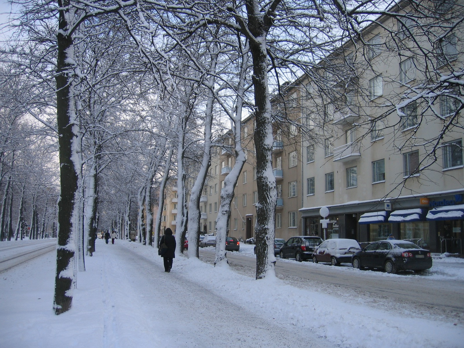 Munkkinemen puistotie/Munksnäs allé in Helsinki, Finland